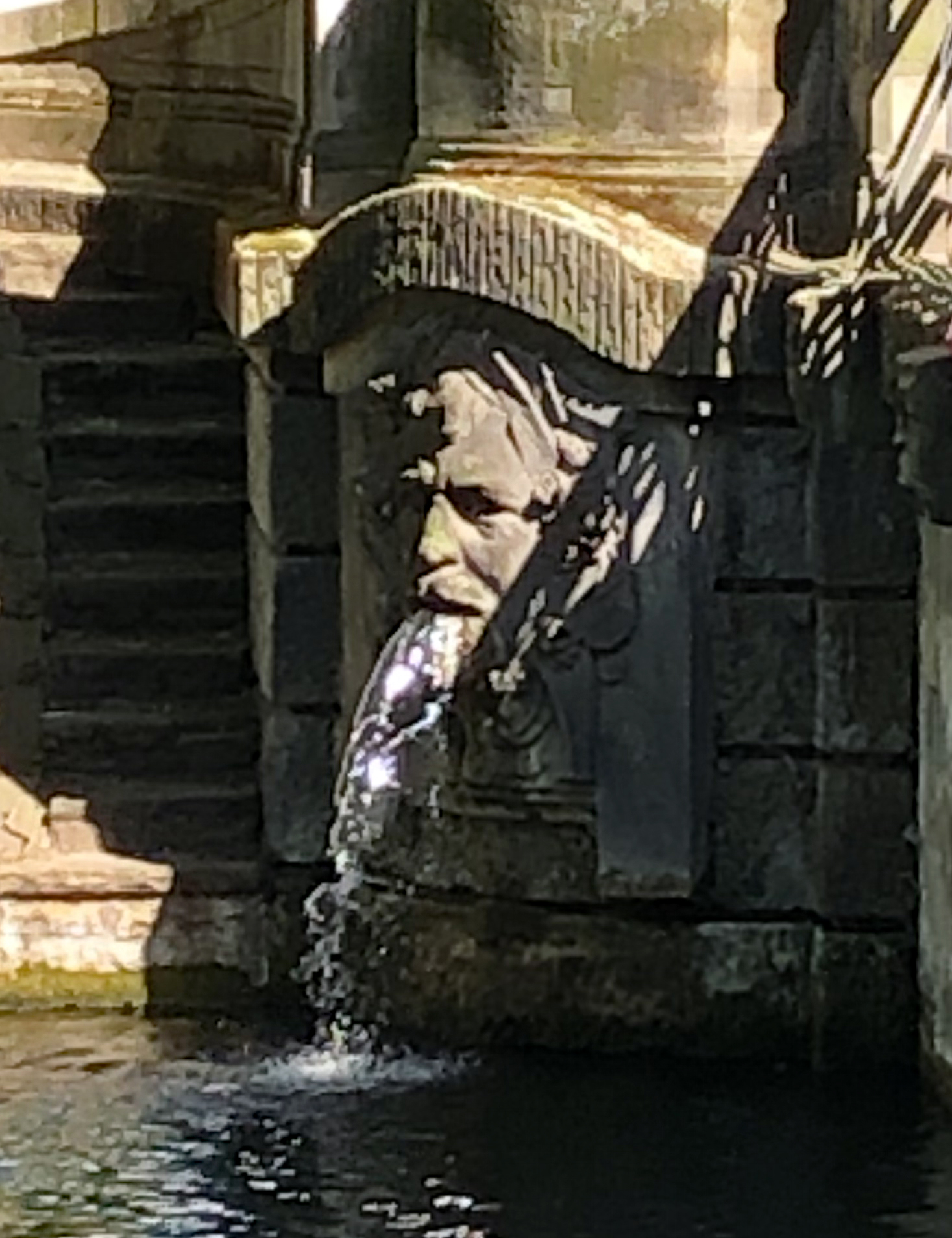 Girardet-Brücke, Wasserspeier Selbstbildnis August Bauer